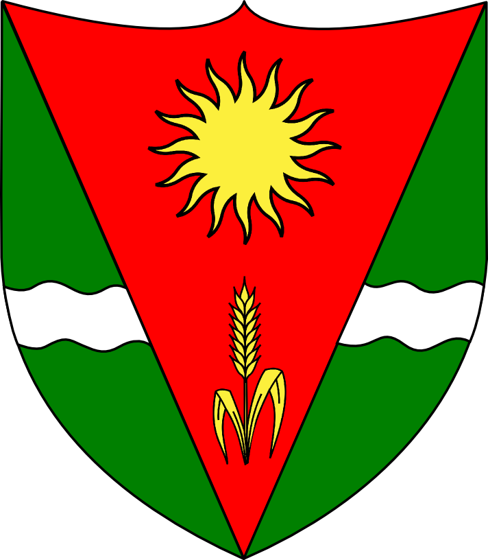 Blason de la commune de Val-de-Ruz